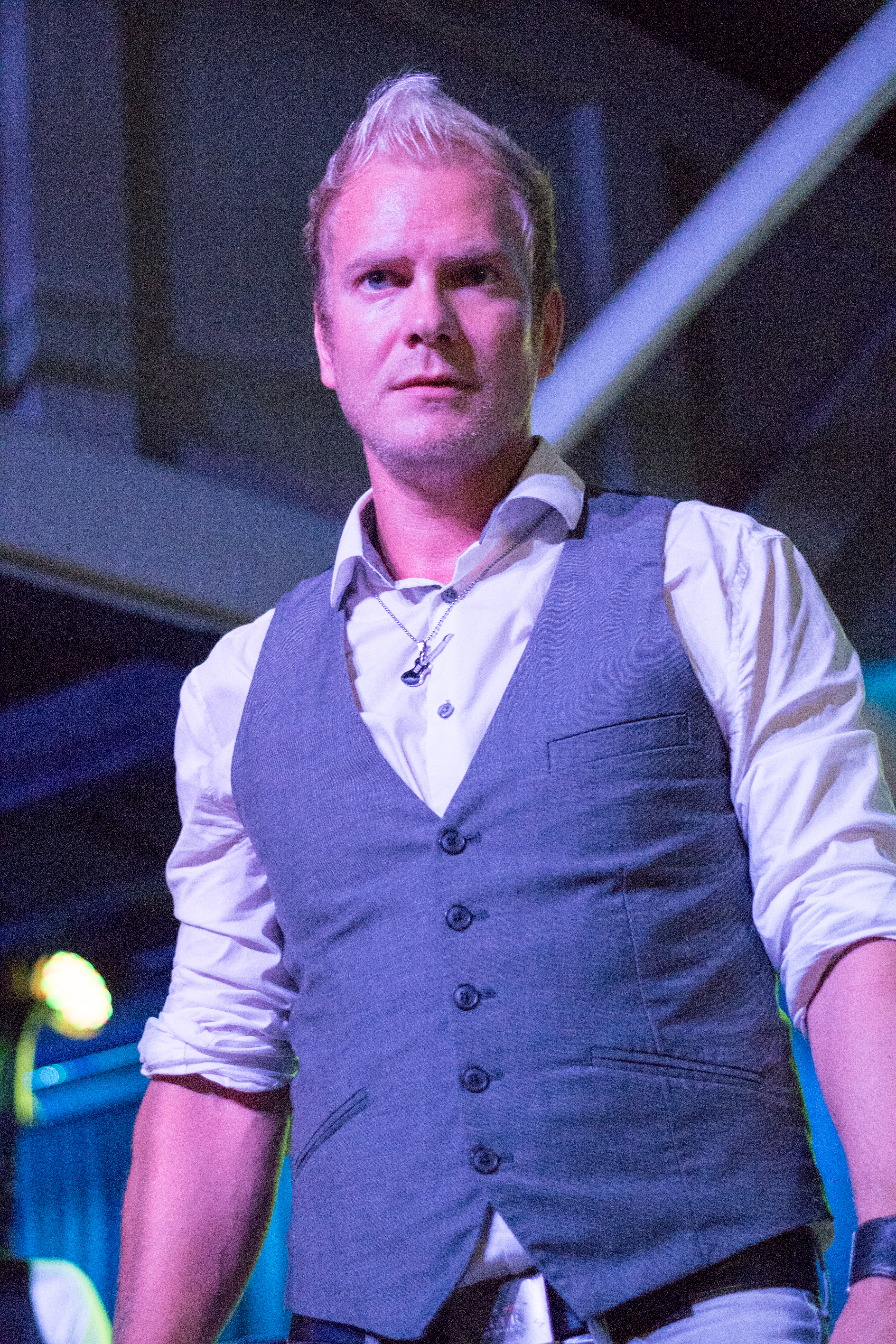 Mikko Mäkeläinen suomalainen laulaja